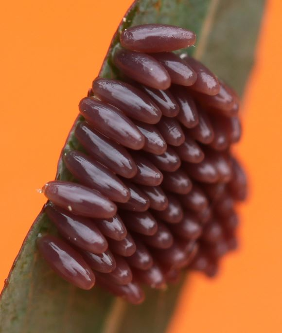 Eier des Pappelblattkäfers (Chrysomela populi) am 13. Mai 2018 nahe Fellbach